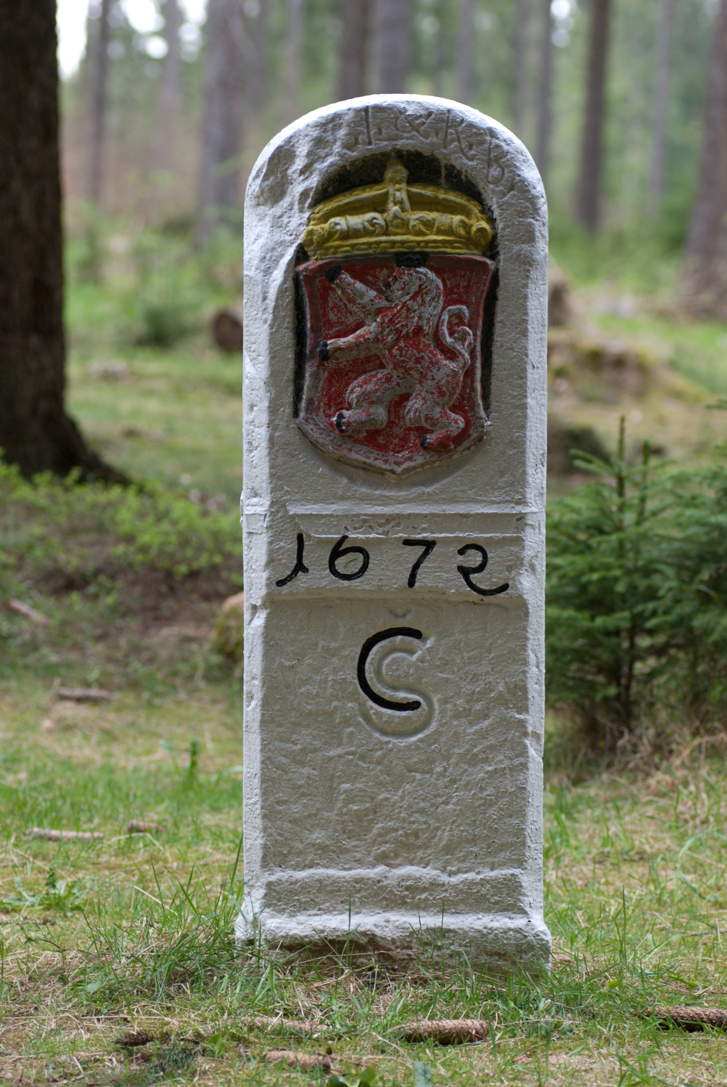 Rudná hora, Potůčky, Krušné hory, hraniční kámen z české strany; více